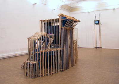 Escultura "Variation in Blau - die Leidenschaft des Reisenden"